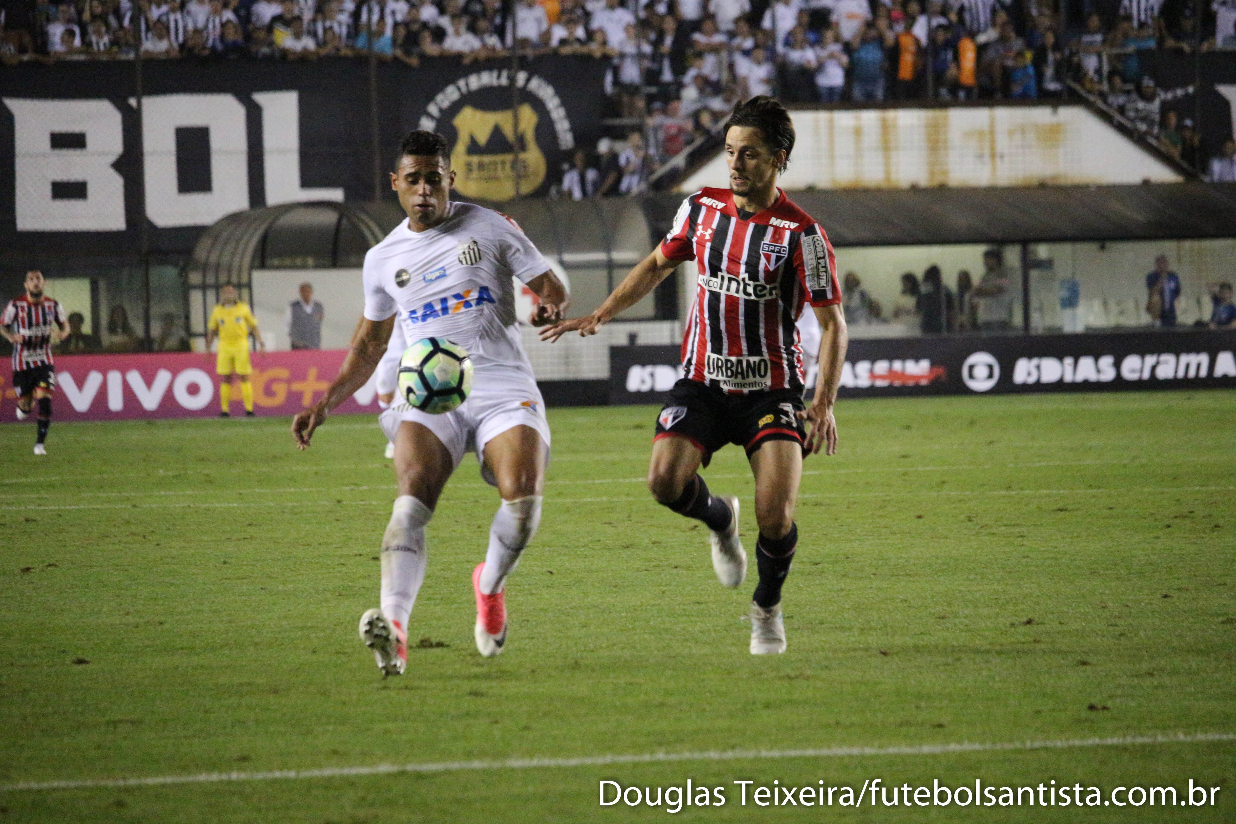 Foto: Douglas Teixeira/futebolsantista.com.br